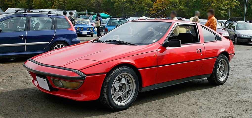 Talbot Matra Murena S